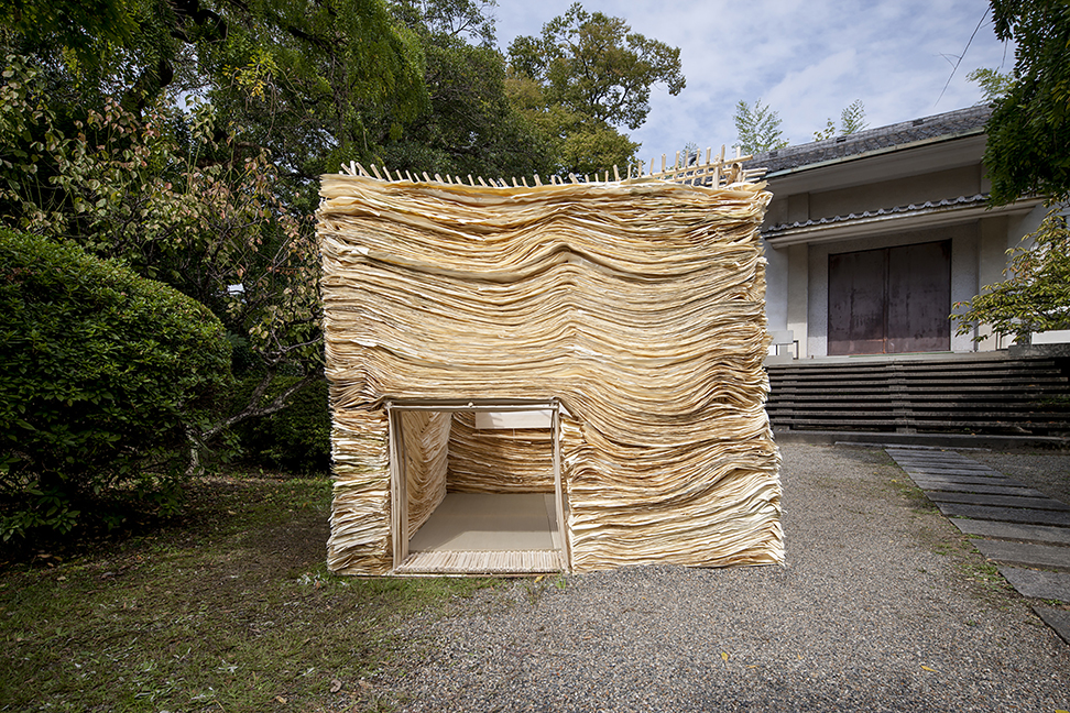 sonypresents